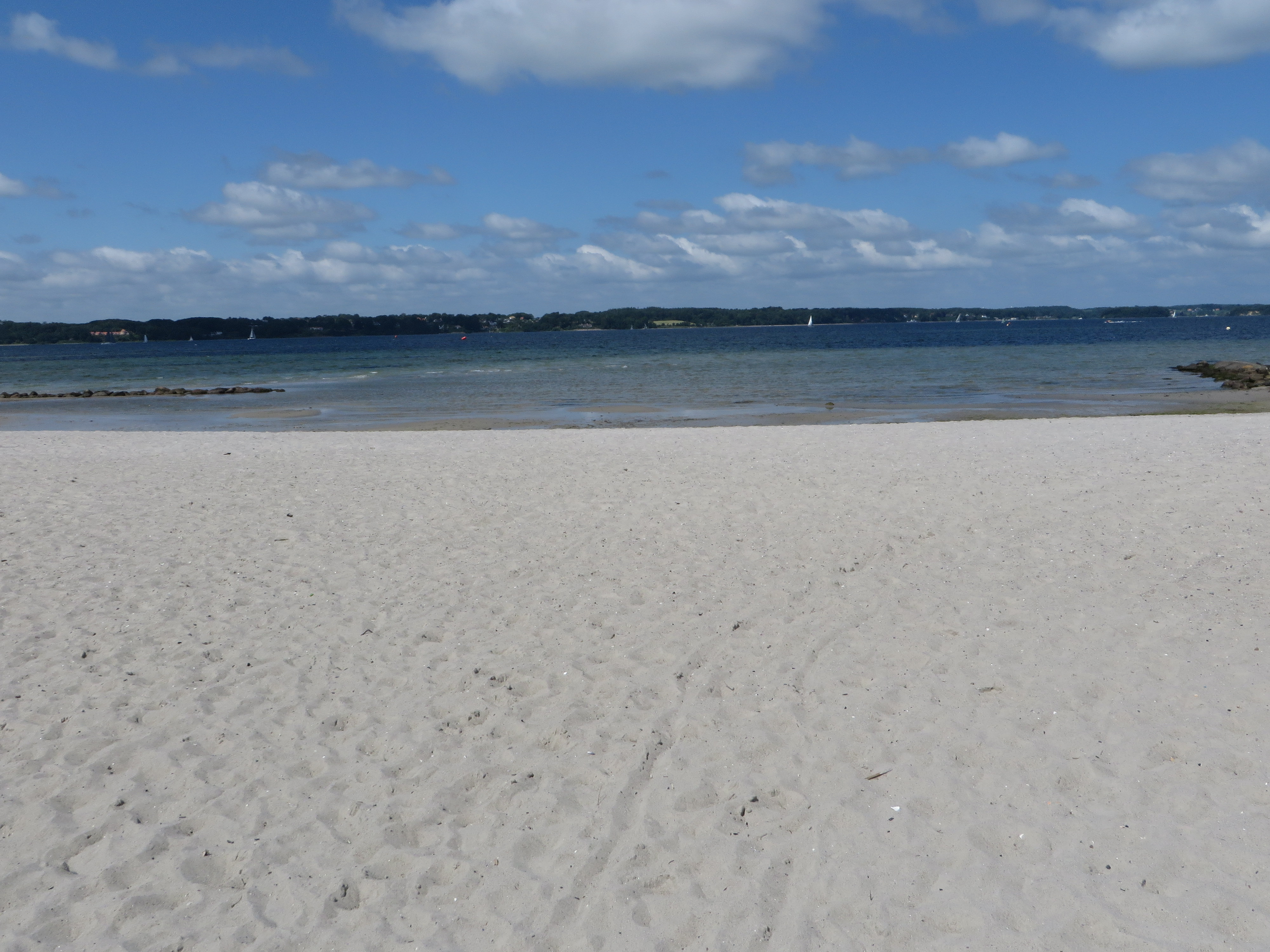 Solitüder Strand zum Sommer hin (Flensburg-Mürwik am 20. Juni 2015), Bild 017